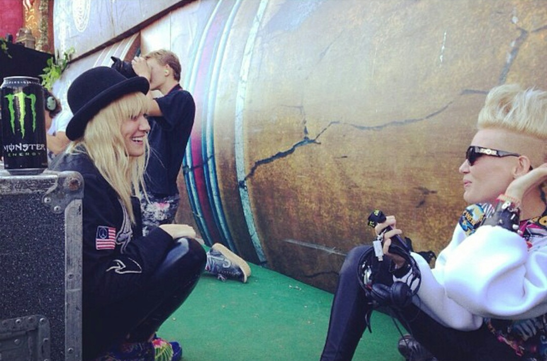 Nervo